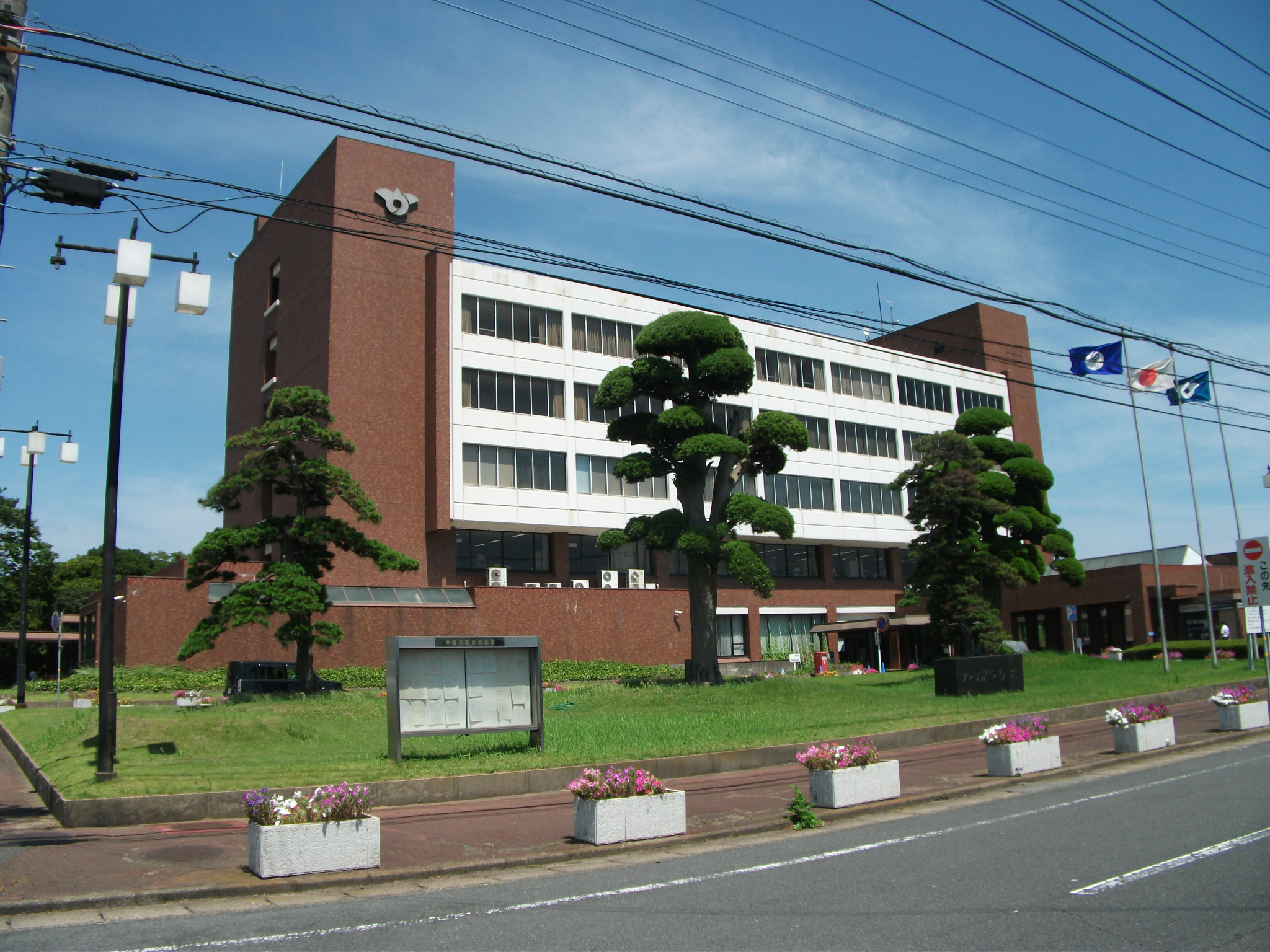 茨城県、神栖市役所